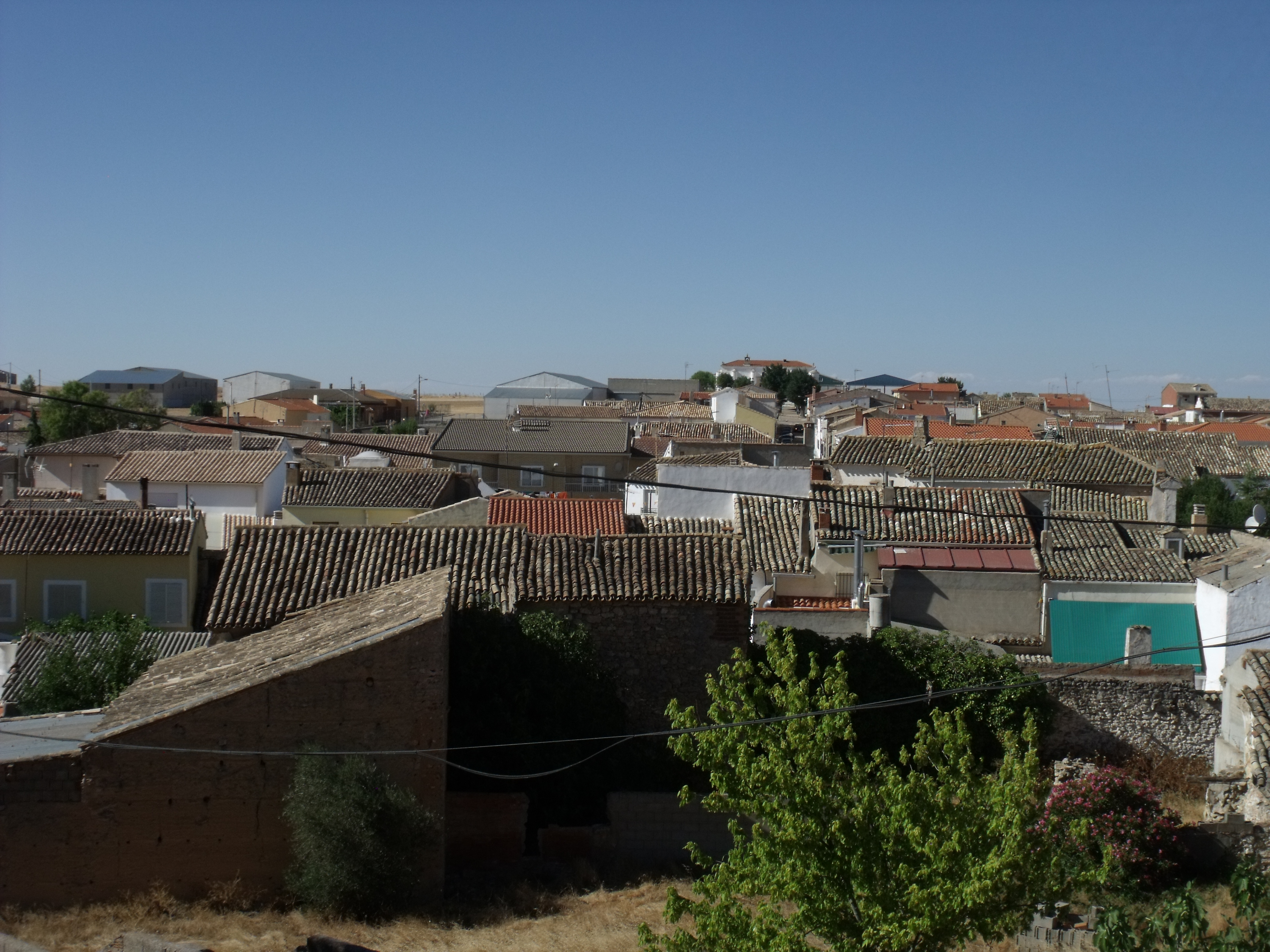 Vistas del pueblo desde la iglesia de Nuestra Señora de la Asunción